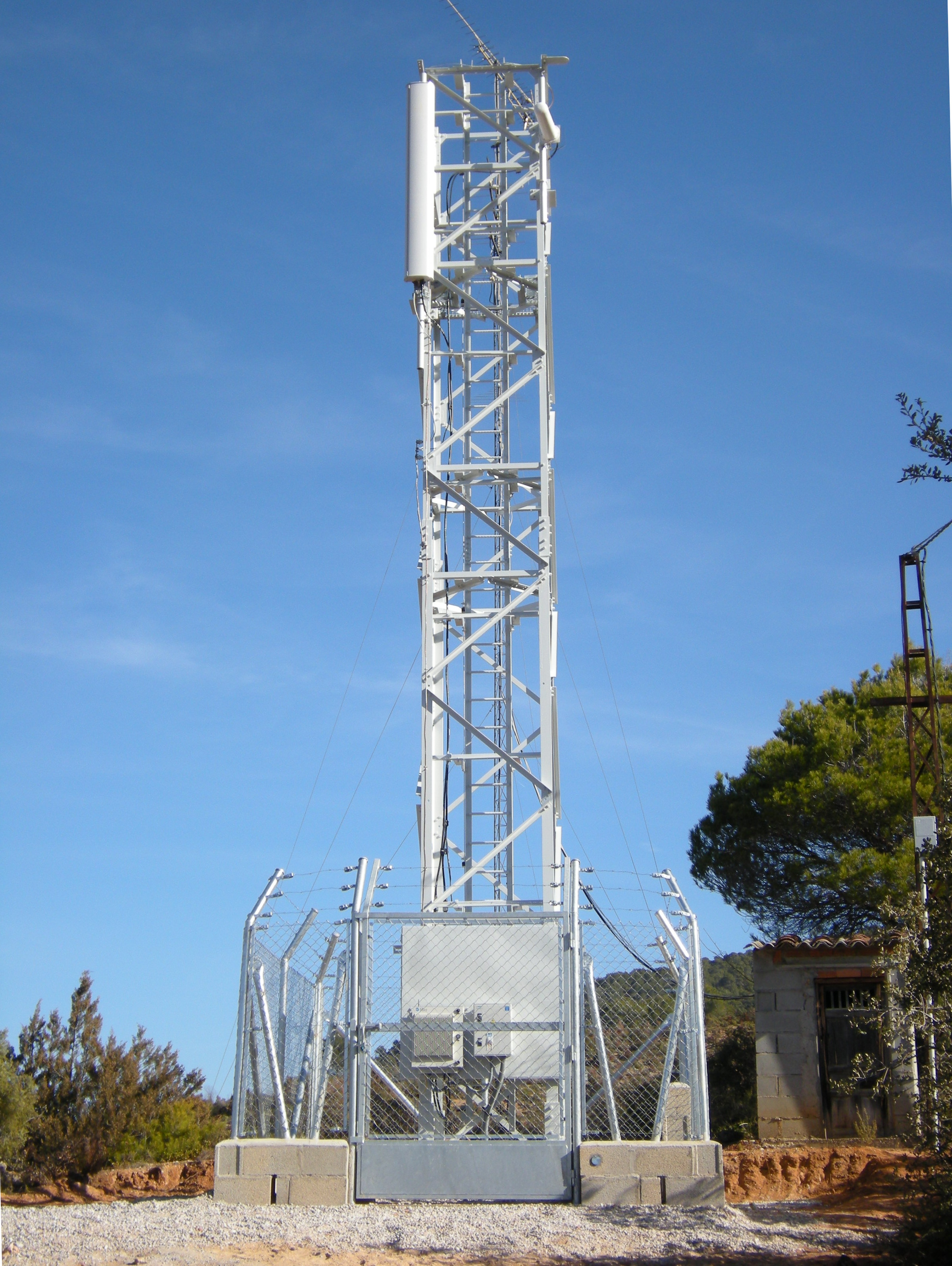 Antena telefonia movil de Huetos (Cifuentes, Guadalajara)